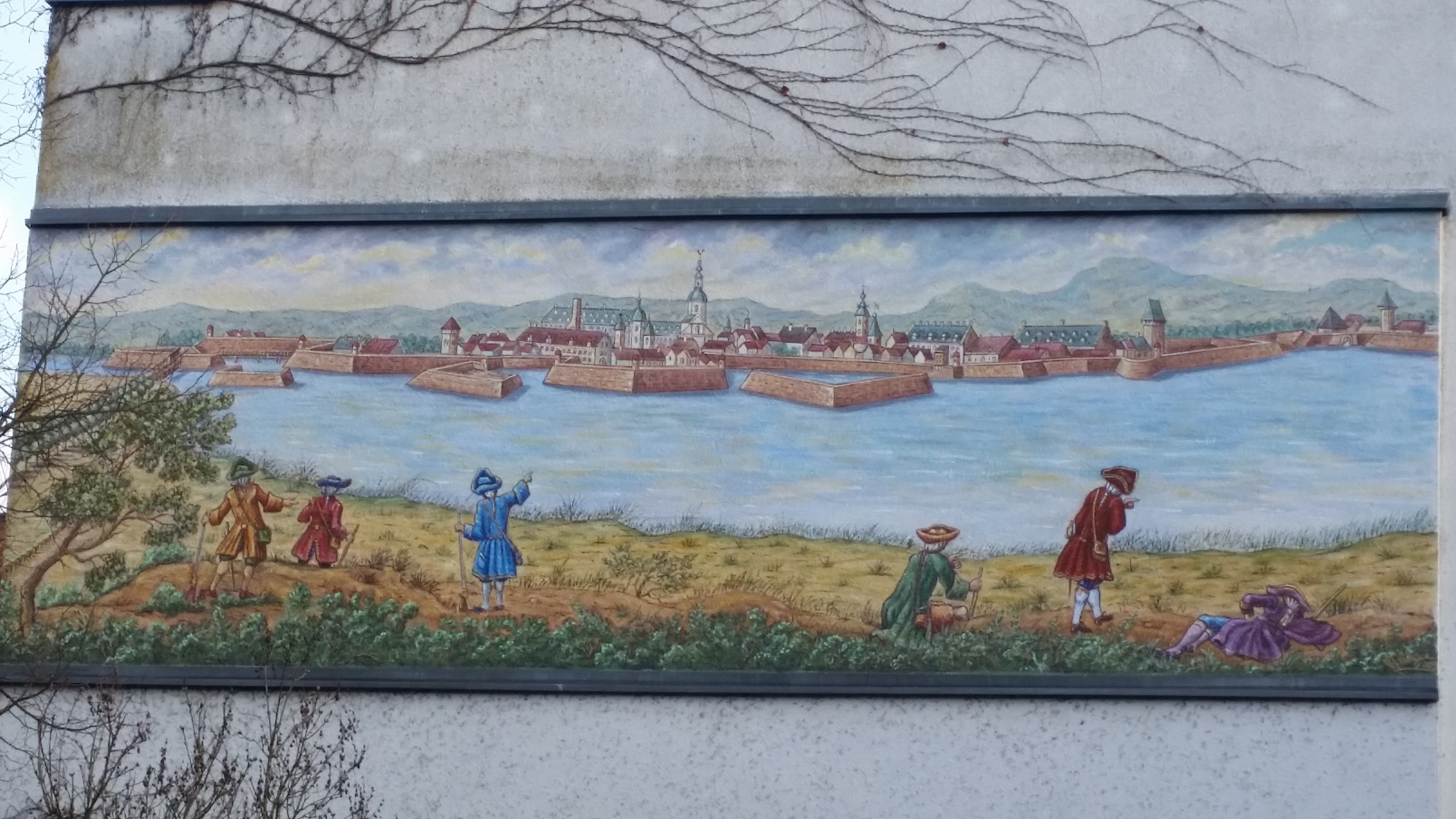 Blick auf die Festung Philippsburg (um 1600?). Wandbild in Philippsburg; Maler Julius Hudec, 2008